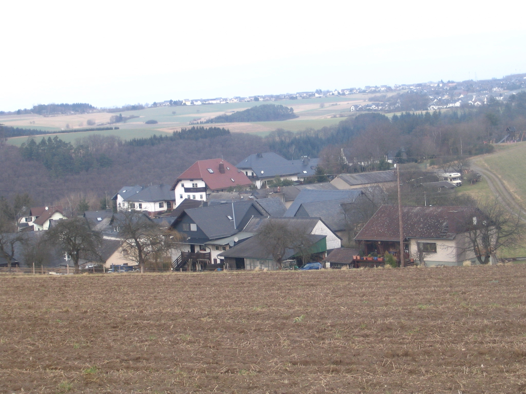 Thörlingen in the Hunsrueck landscape, Germany Johannes Strieder der 1858 nach Sudamerika audswanderte seine nachkommen kolonisierten SudBrasilien und NordArgentinen. "Strieders Mühle" Museum von Fernando Strieder Schneider - Brazilian